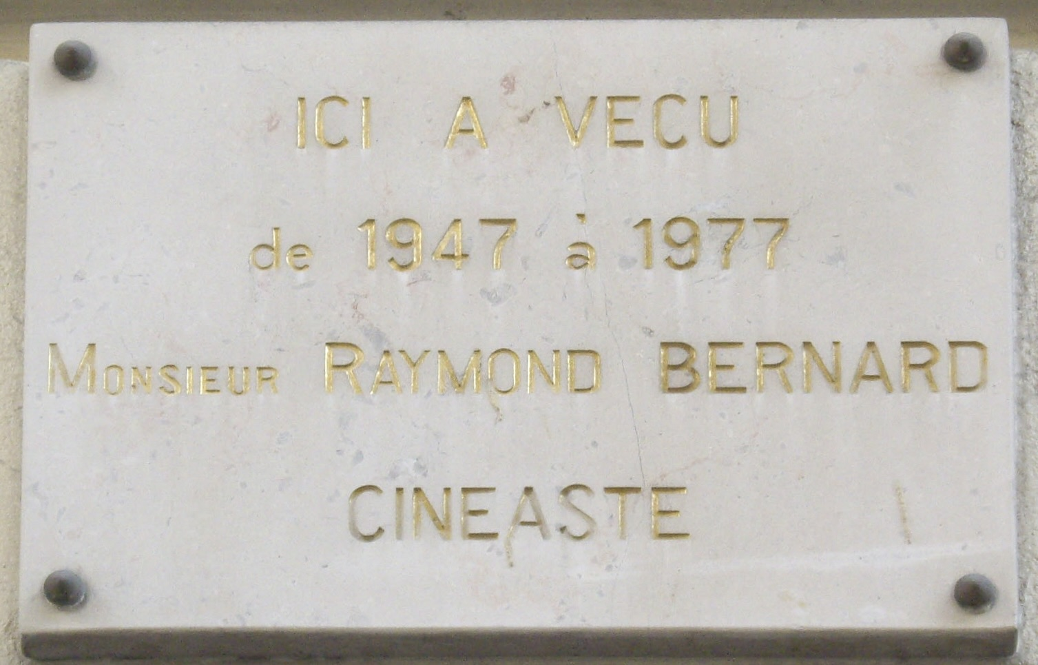 Plaque commémorative, 55 rue Pergolèse, Paris 16e. « Ici a vécu de 1947 à 1977 Monsieur Raymond Bernard, cinéaste. »